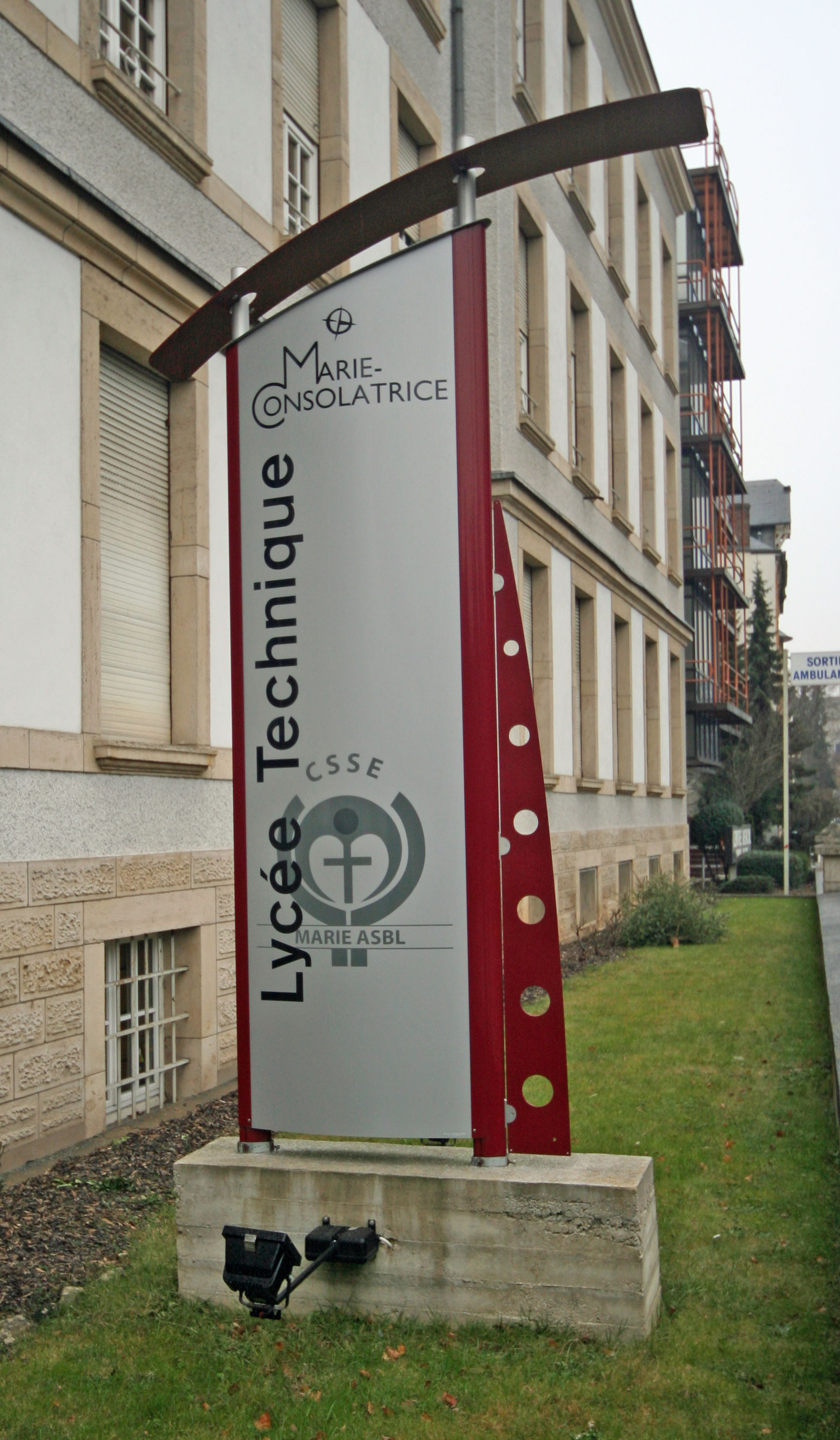 LTPEM Schëld